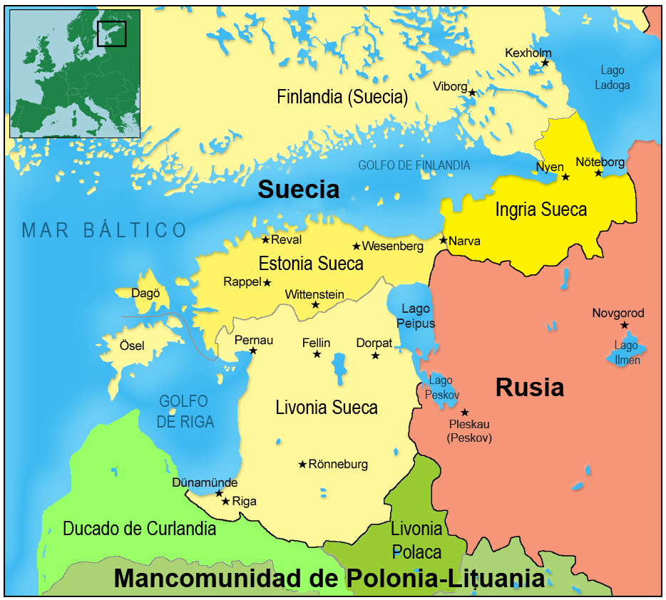 Die obere Ostsee unter schwedischer Herrschaft 1580-1721